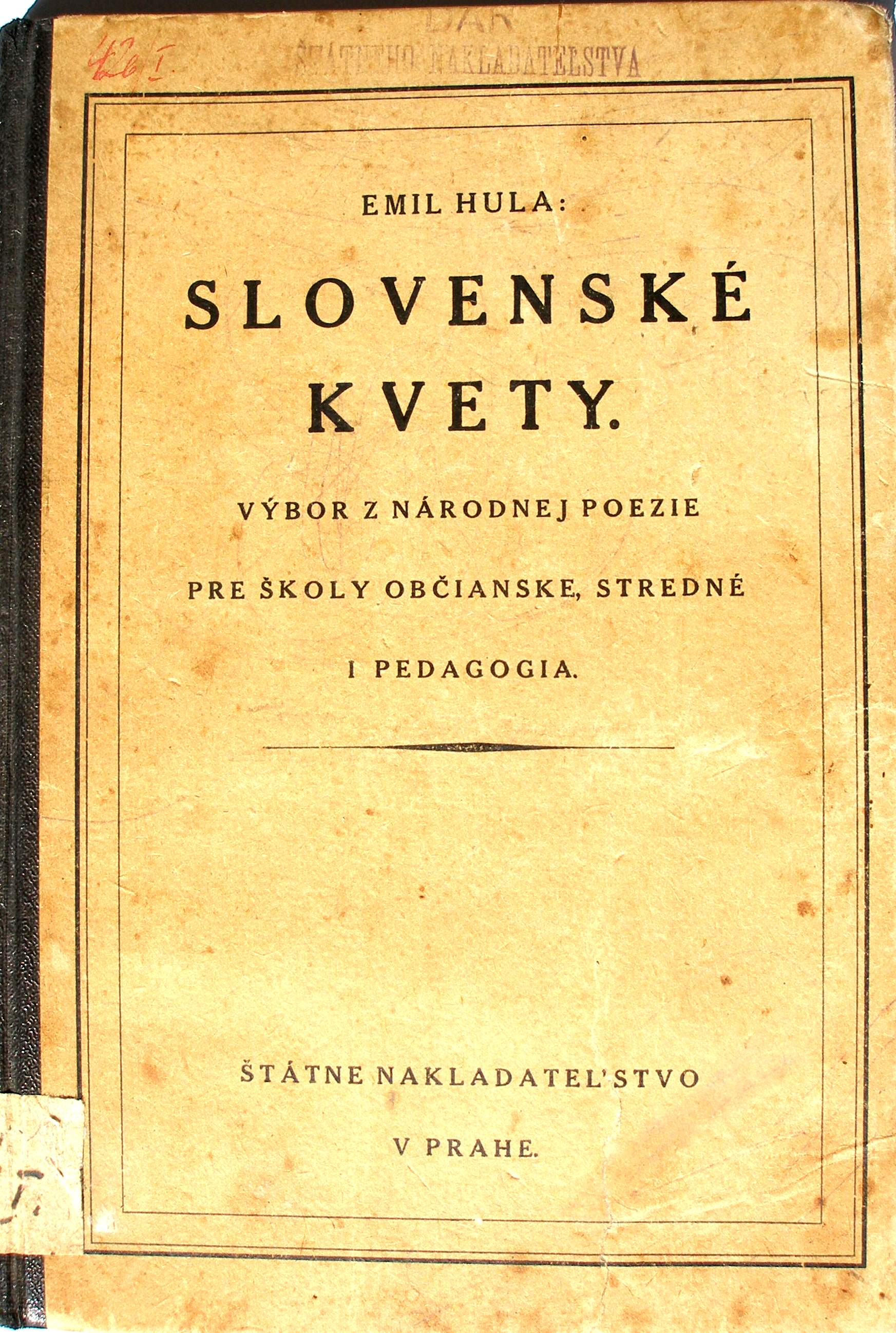 reprodukcia z učebnice Emil Hula: Slovenské kvety, rok vydania 1923